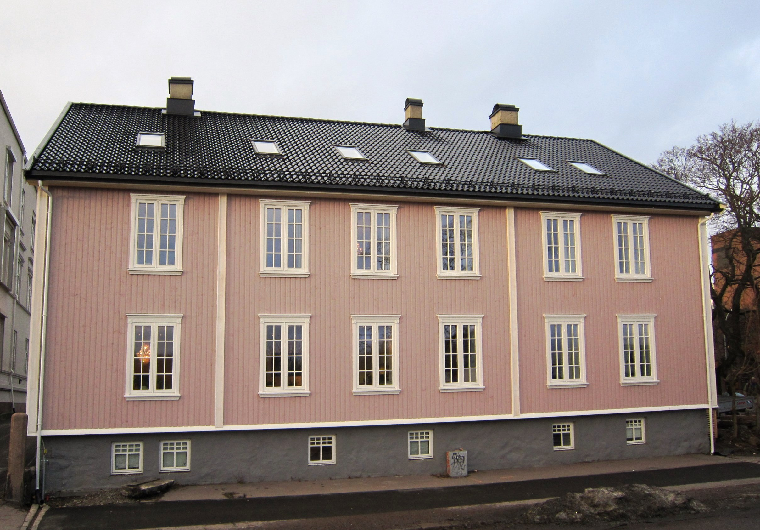 Akersbakken 33 i Oslo, tilholdssted for Cinenord. Trebygning oppført ca. 1750. Bygning fra Aker prestegård. Tidligere adresse: Bergstien 4.